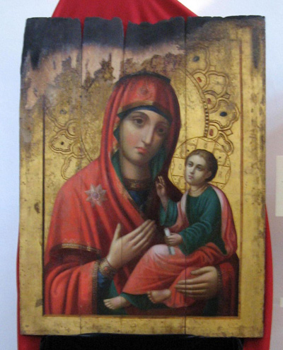 Обгоревшая икона Богородицы Одигитрии (Киево-Печерская лавра, 19 век), найденная среди руин Успенской церкви, уничтоженной в 1941 году